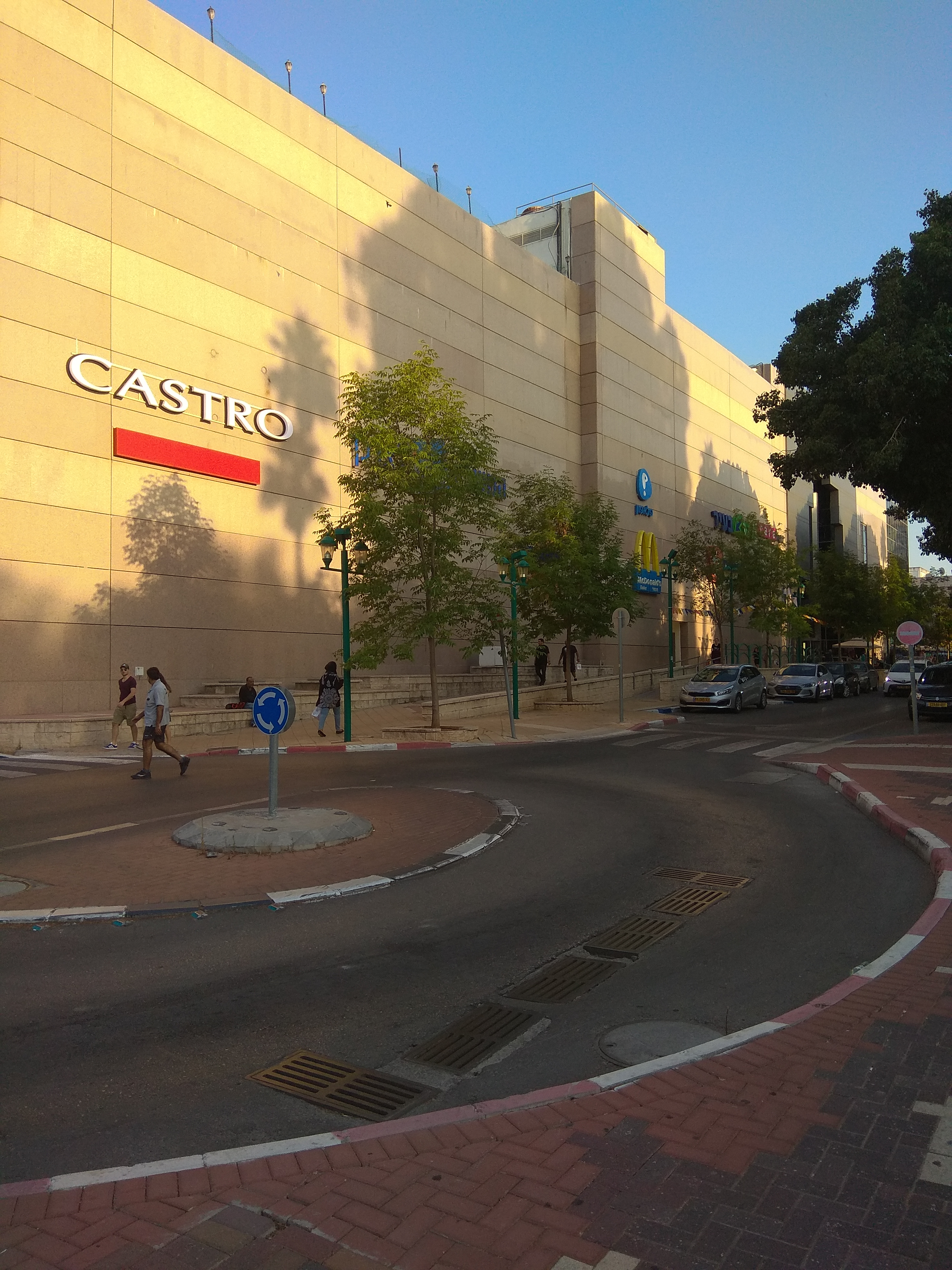 קניון לב חדרה